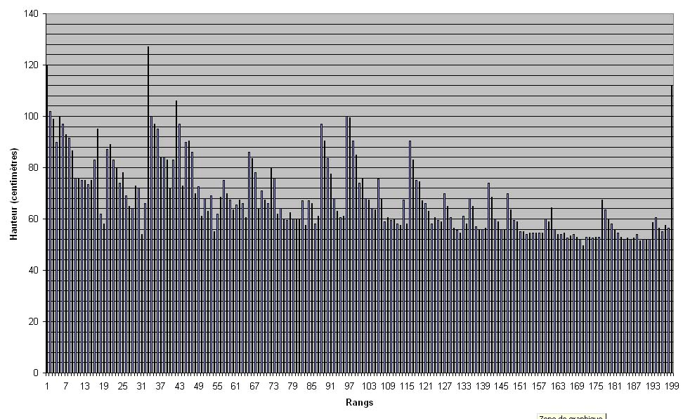 Représentation graphique de l'évolution de la hauteur des rangs d'assises de la pyramide de Khéops